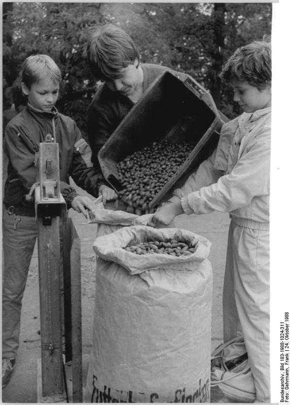 Berlin, Tierpark, Ankauf von Eicheln ADN-ZB Gehrmann-24.10.1988-Berlin: Wer verzehrt hierzulande Eicheln? Es sind nicht nur Hirsche, Bisons und Schafe im Tierpark - auch Antilopen und Affen schätzen den Sammeleifer vieler Hauptstädter. Derzeit werden im Tierpark täglich bis zu 500 Kilo Eicheln aufgekauft. Zu den fleissigen Sammlern gehörten mit 25 Kilo Martin und Matthias aus der 22. Oberschule. Die Futtermeisterei ist bis zum 31.10. täglich (außer Sonntags) von 9 - 15 Uhr geöffnet.